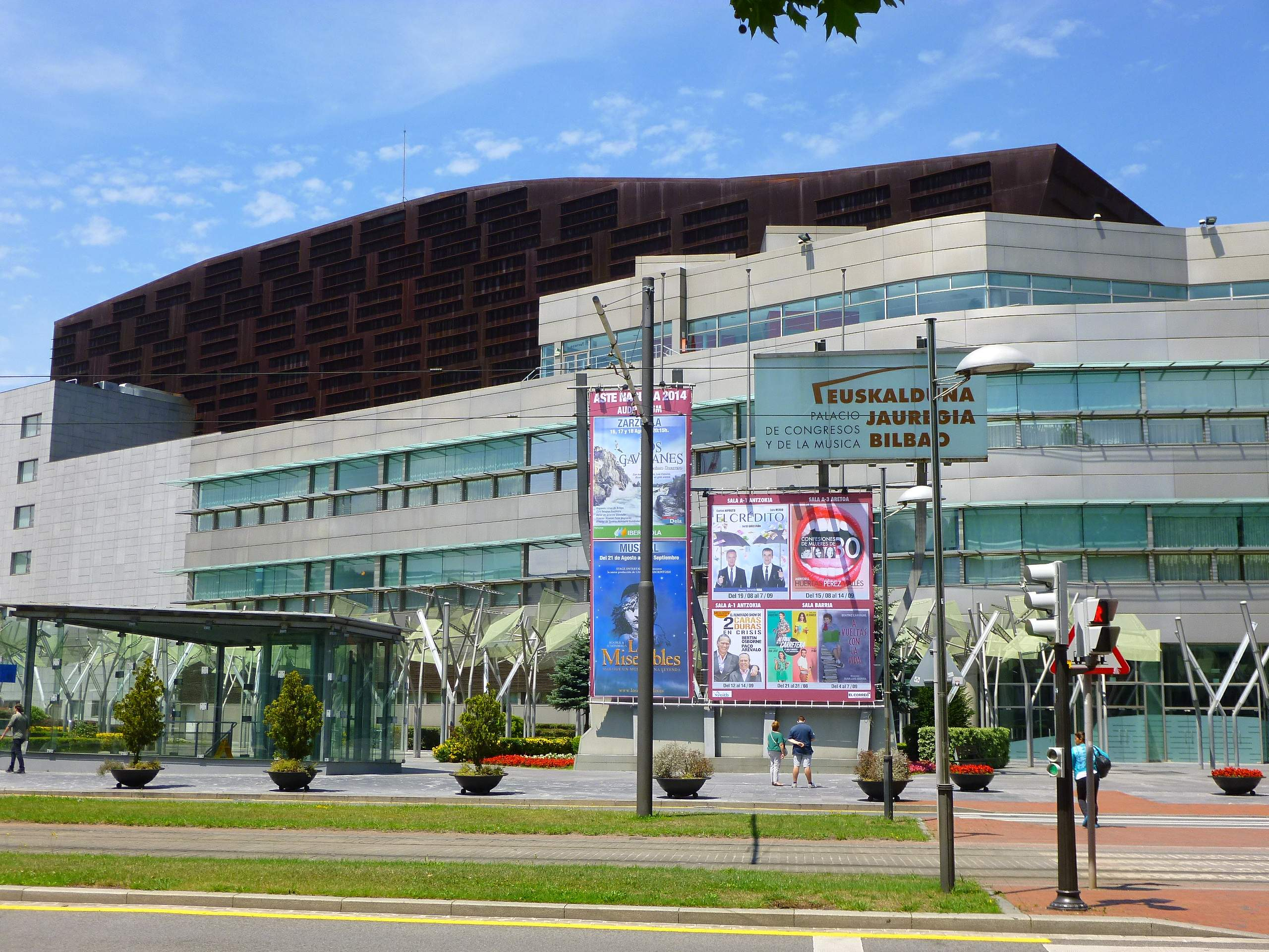 Palacio Euskalduna de Congresos y de la Música (Bilbao)